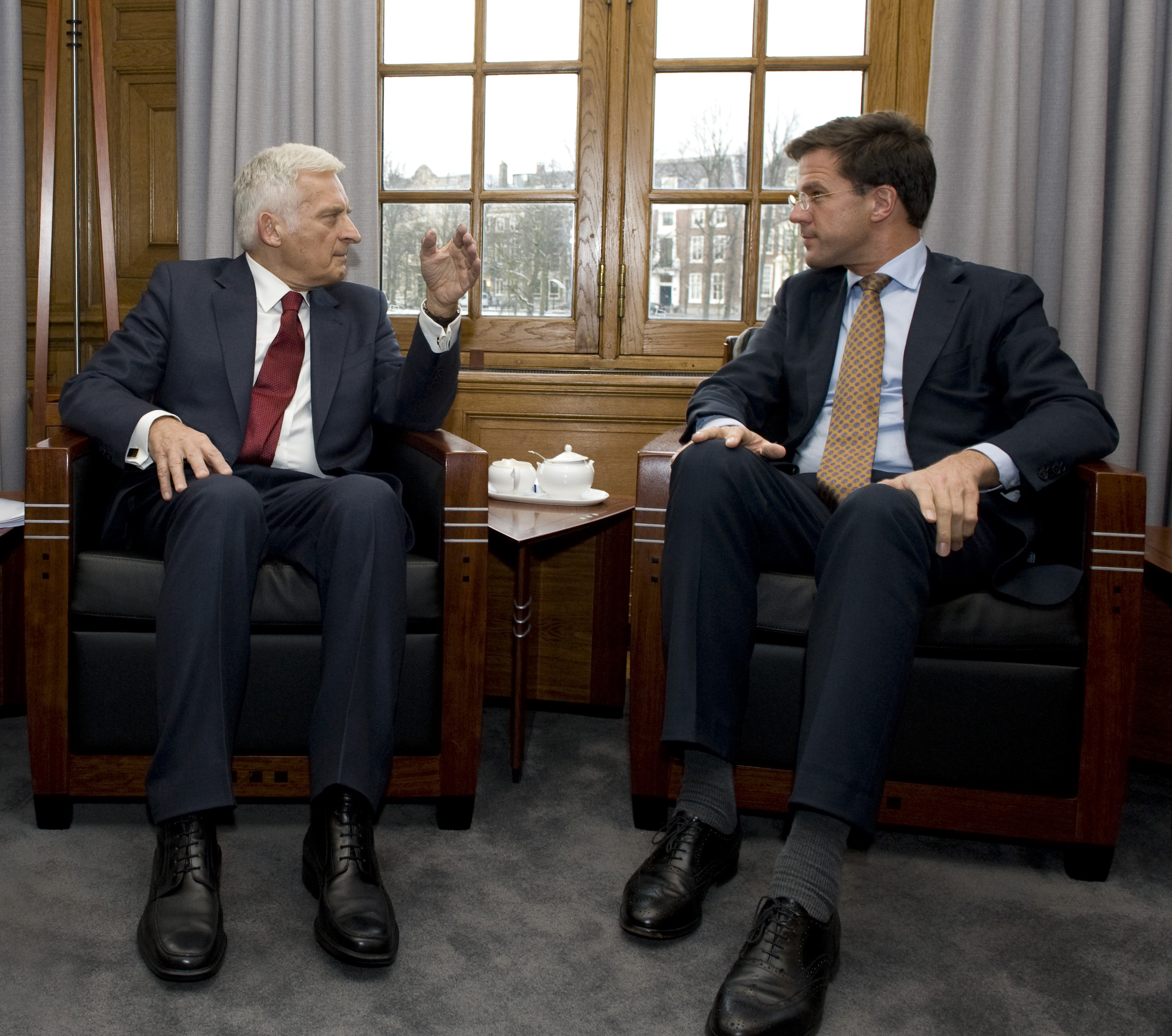 Jerzy Buzek, de voorzitter van het Europees Parlement, wordt door minister-president Rutte ontvangen in het Torentje. De twee spraken onder andere over de Europese agenda, de samenwerking tussen de EU-instellingen en de begroting van 2011.